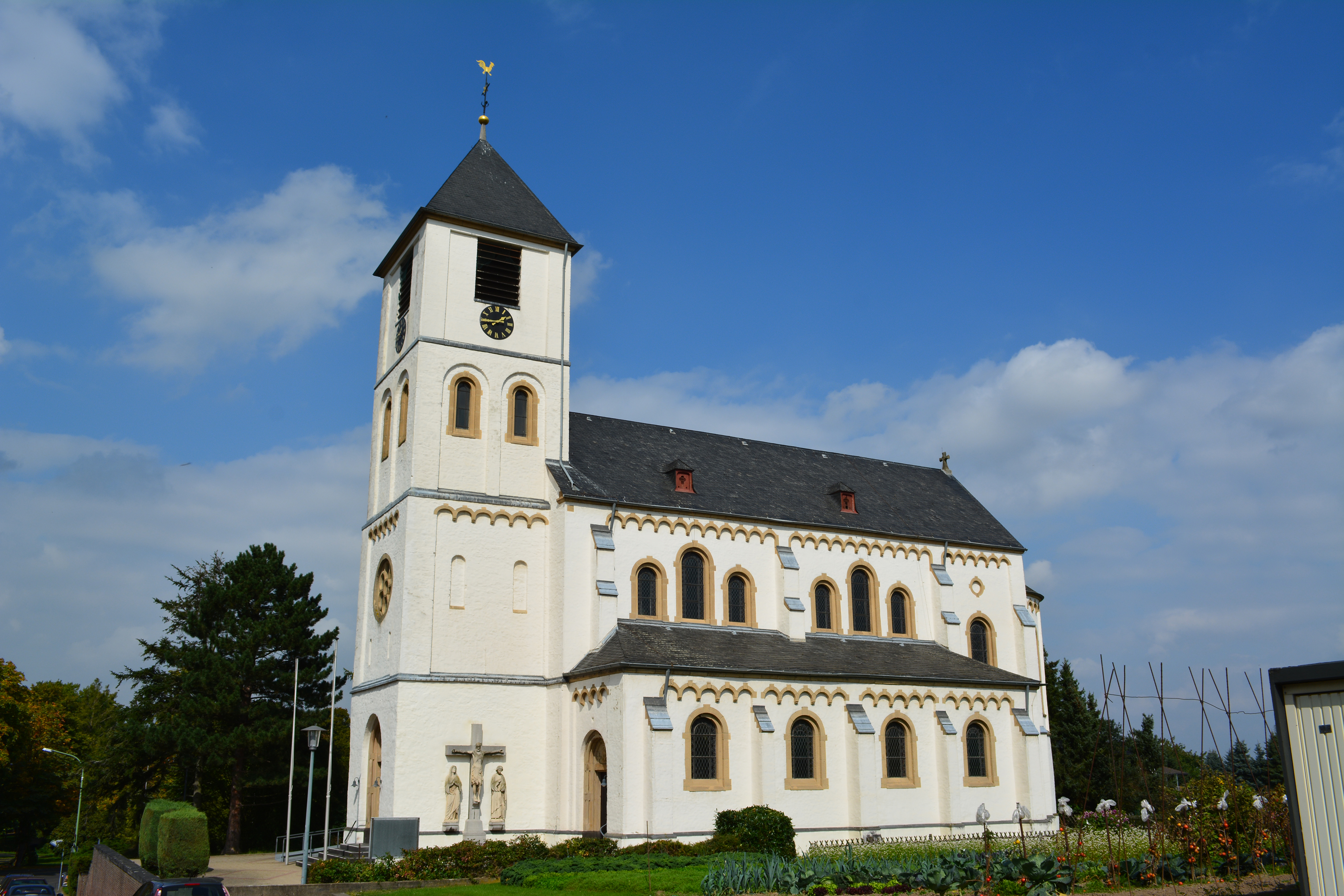 St. Martinus, Düren - Birgel This is a photograph of an architectural monument. /003